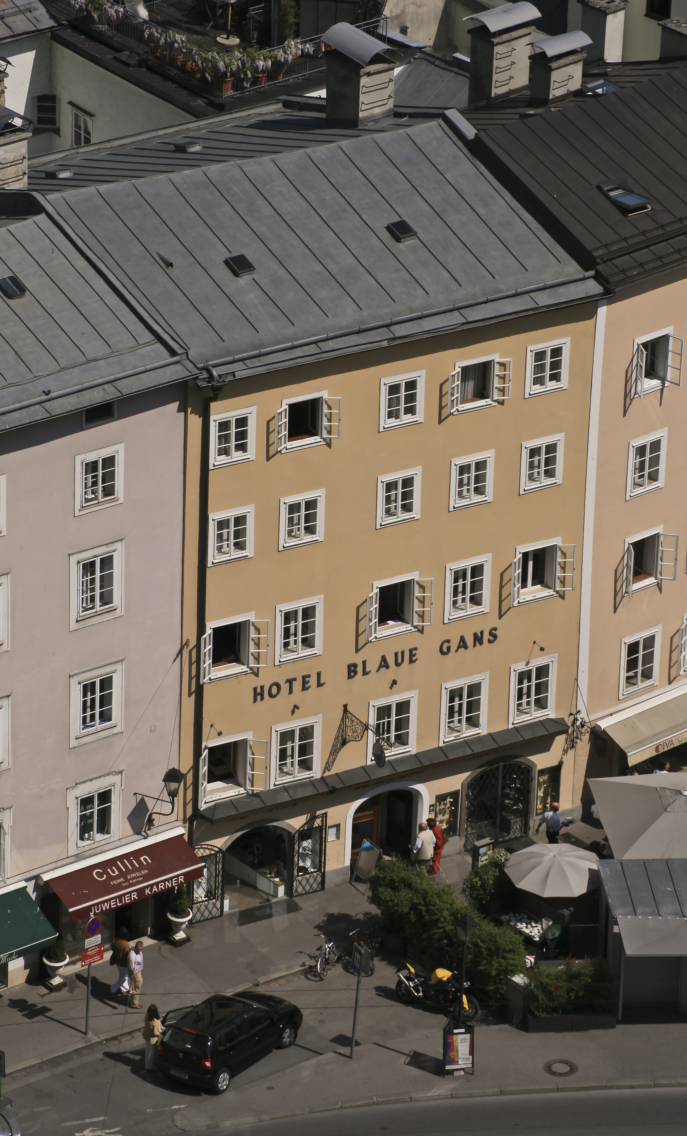 Gasthaus, Zur Blauen Gans